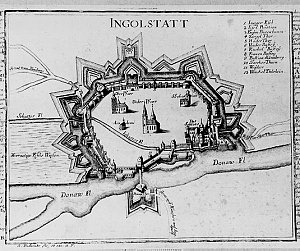 Festung Ingolstadt um 1687